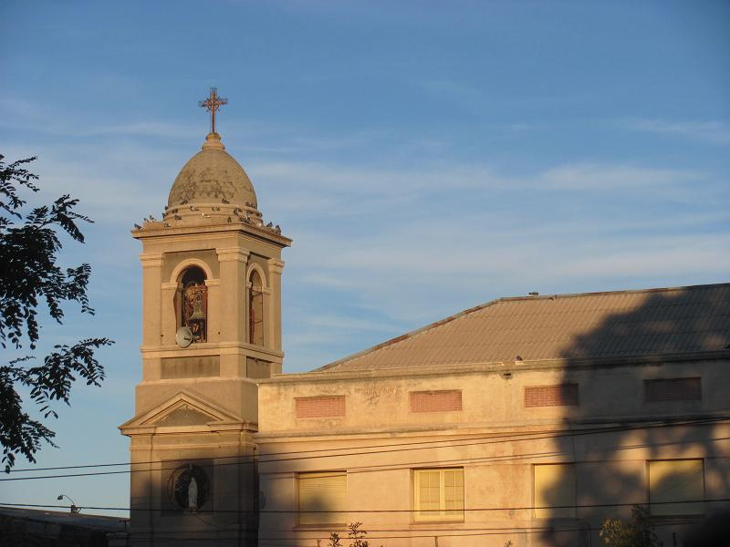 Iglesia de la localidad de Victorica, Departamento Loventué, Provincia de La Pampa, Argentina.